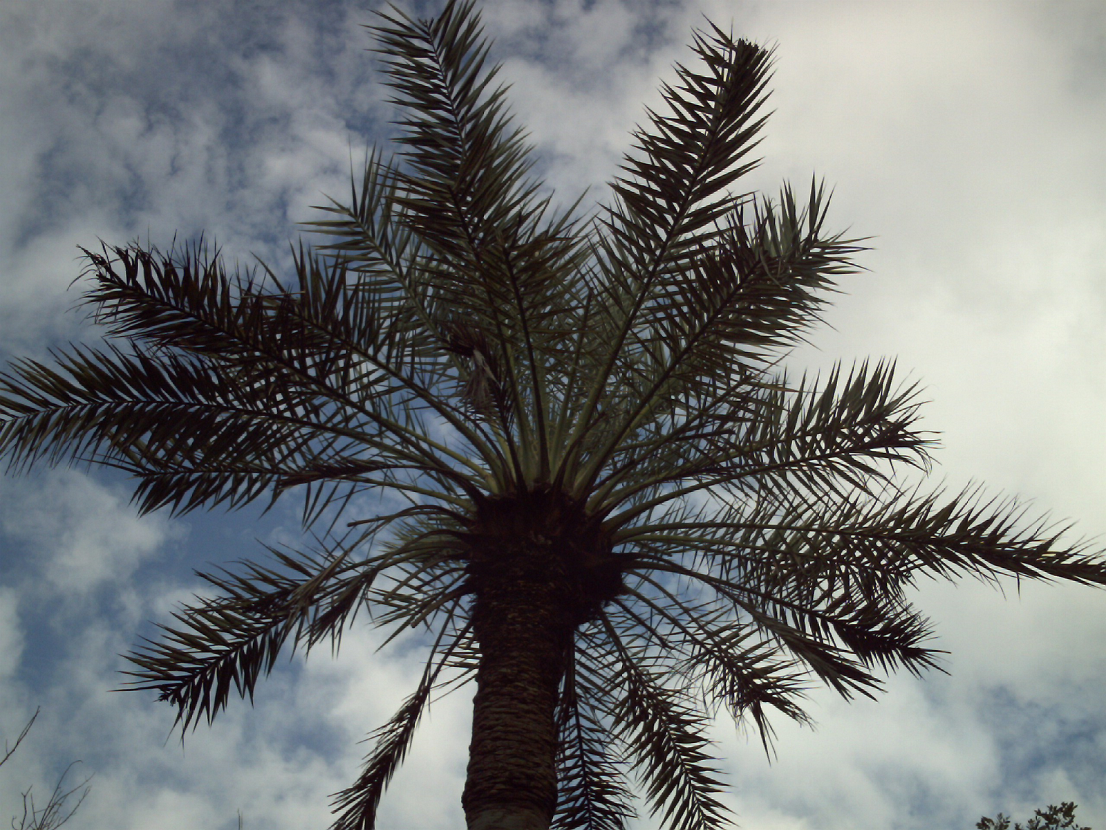 Phoenix dactylifera, in Nueva Esparta